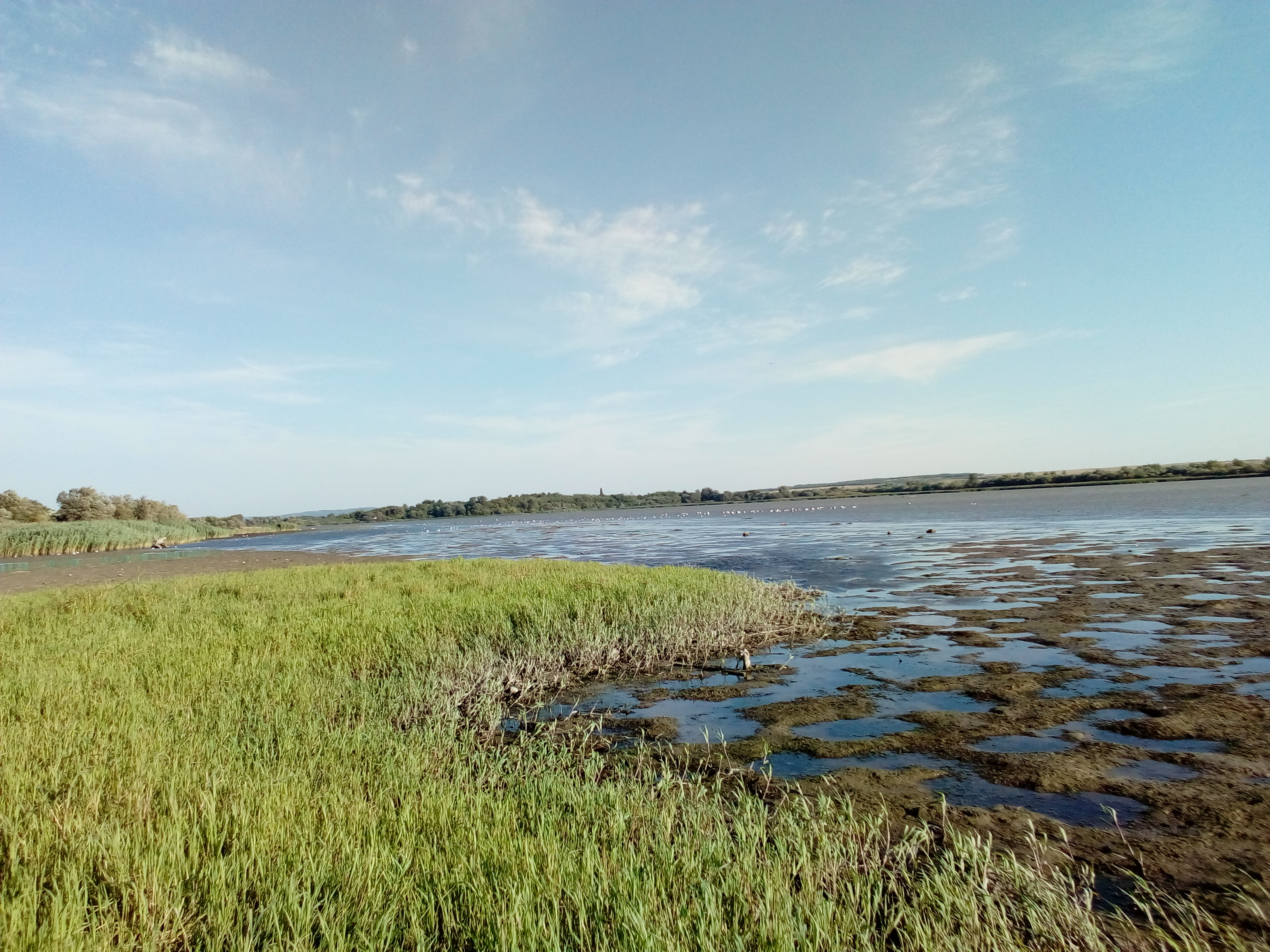 Srpski (latinica): Mesto hvatanja ptica u vertikalne ornitološke mreže na kampu Društva za zaštitu i proučavanje ptica Srbije.